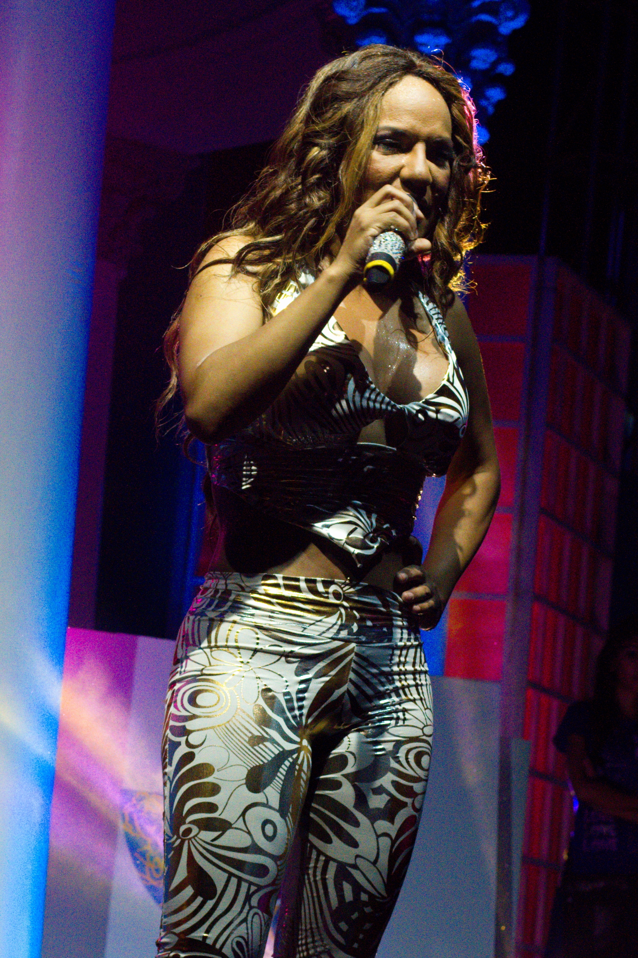 Sandra Sandoval, cantante panameña de música típica, en concierto en Chitré, provincia de Herrera. Fiesta de Fiestas 2012.